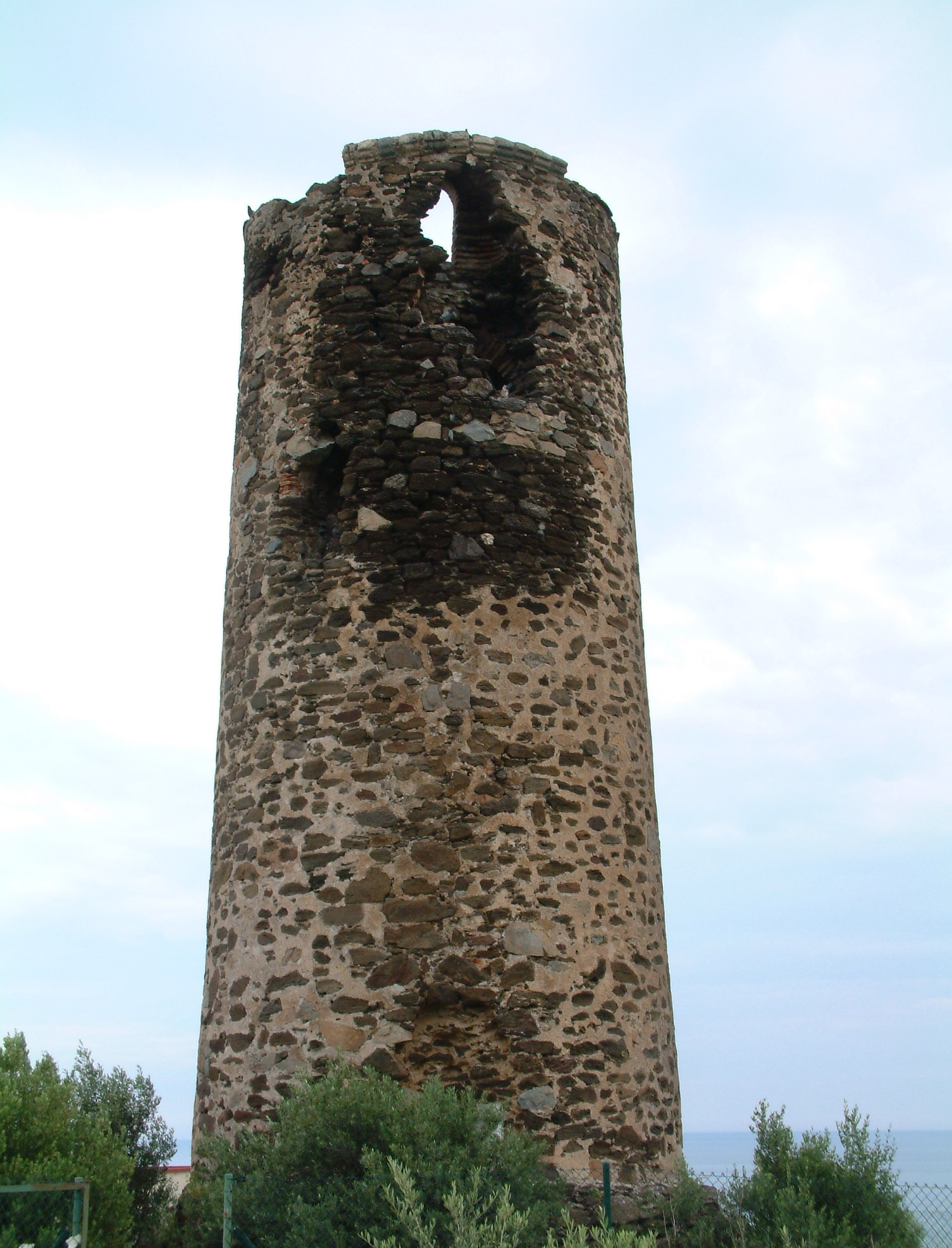 Torre Quebrada. Torre vigía de los siglos XIV-XV